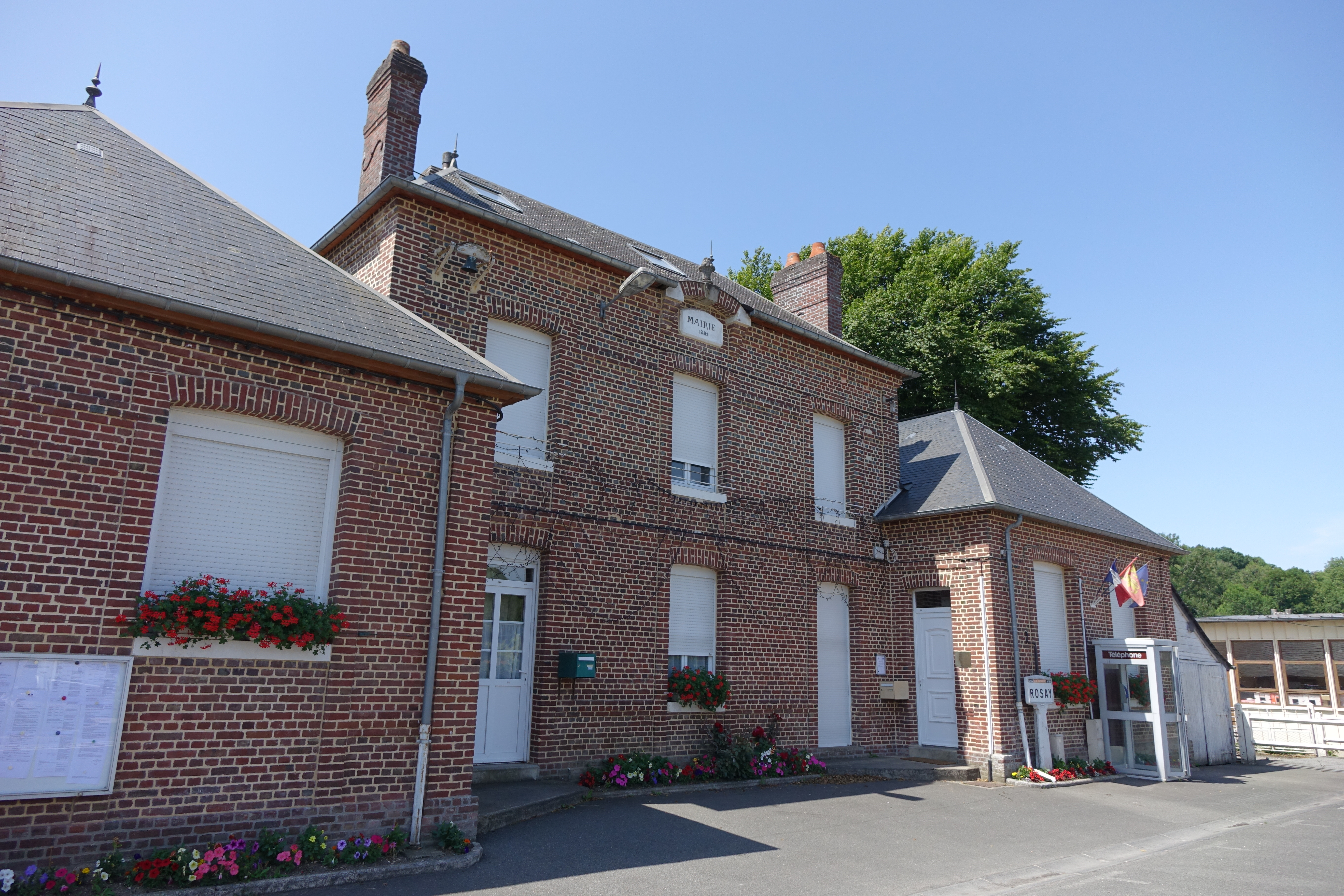 Mairie de Rosay, Seine-Maritime, France